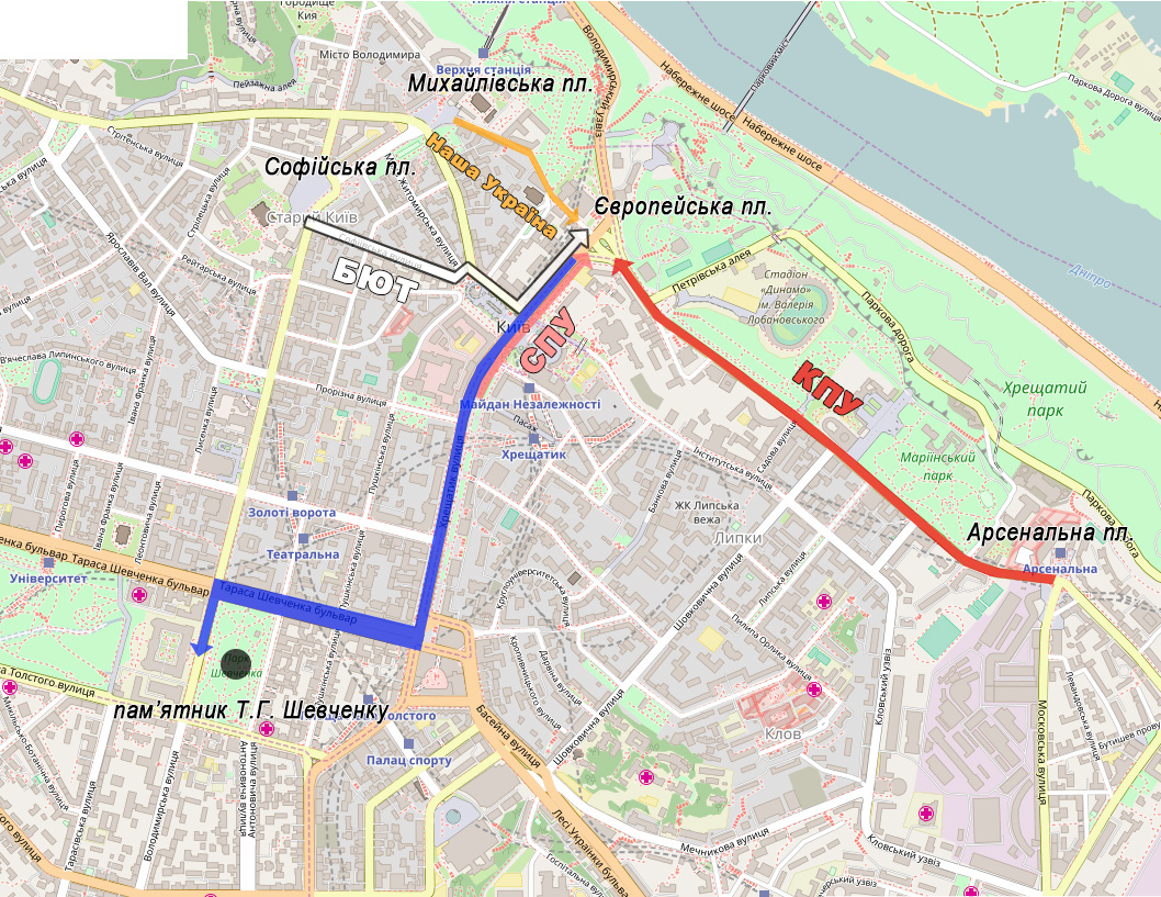 Хід акції "Повстань, Україно!" 9 березня 2003 року в Києві. Рух колон демонстрантів від місць формування колон політсил до Європейської площі, а звідти - до Пам'ятника Шевченкові. Реконструйовано за повідомленнями ЗМІ.